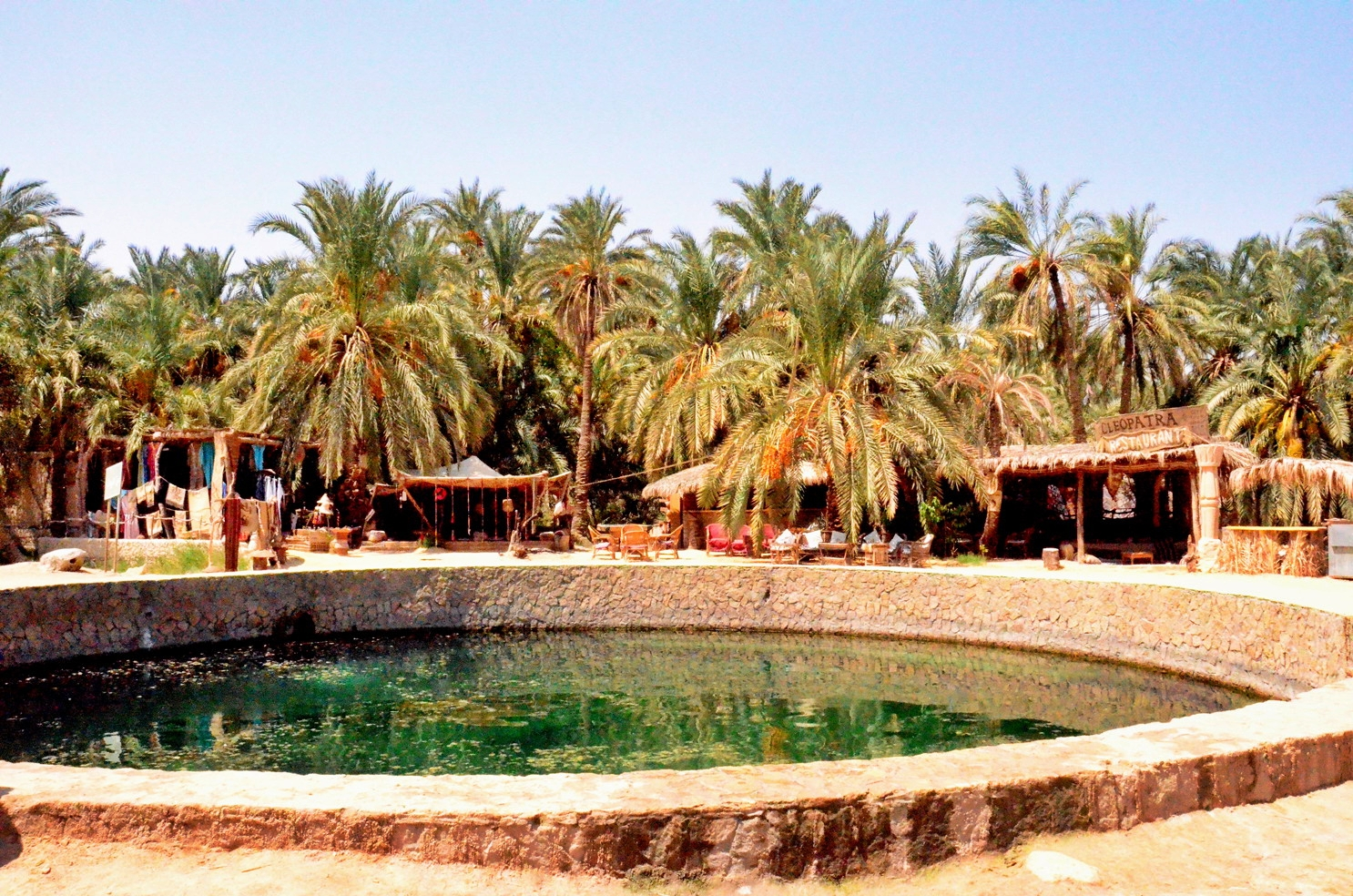 Bains de Cléopatre